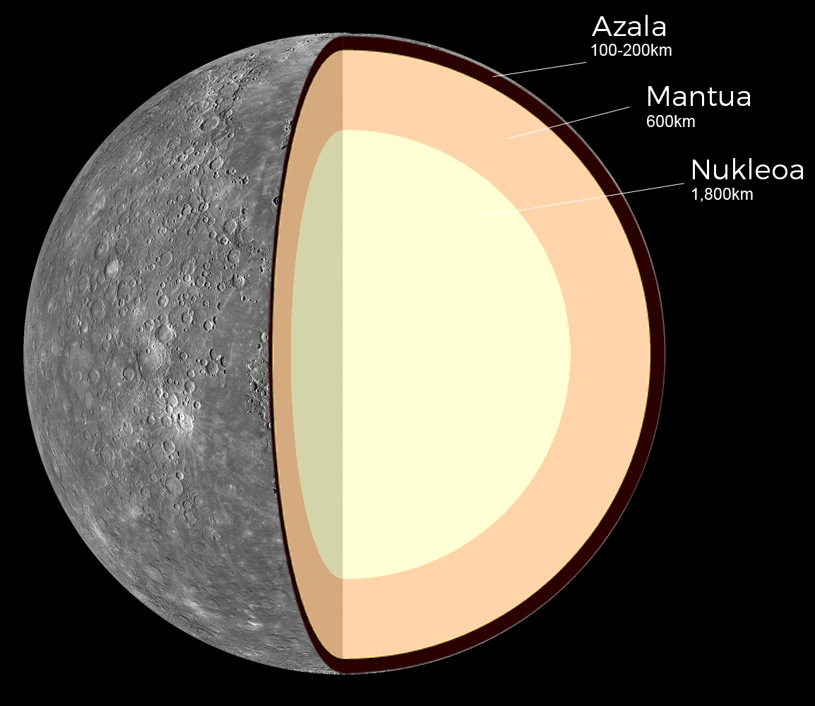 Merkurioren barne egitura eskematikoa